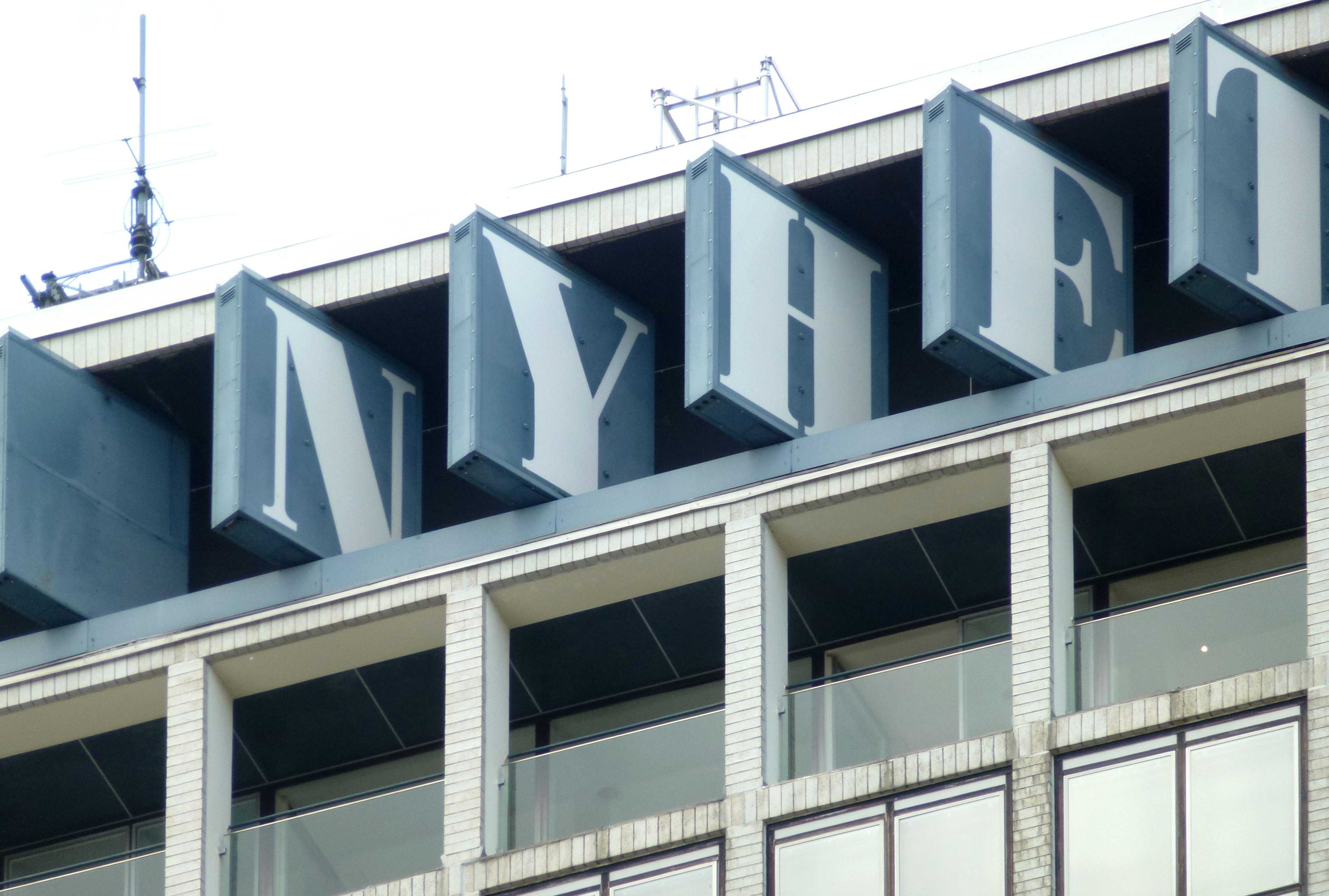 DN-skylten på Dagens Nyheters höghus i Stockholm